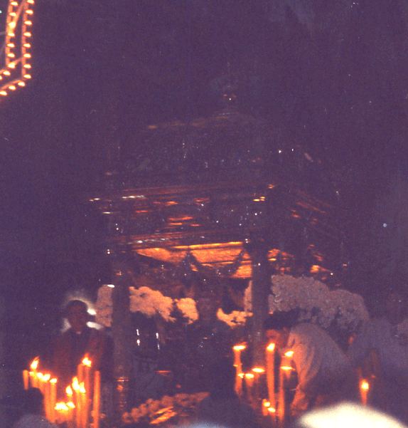 Il fercolo di Sant'Agata durante la festa a Catania.